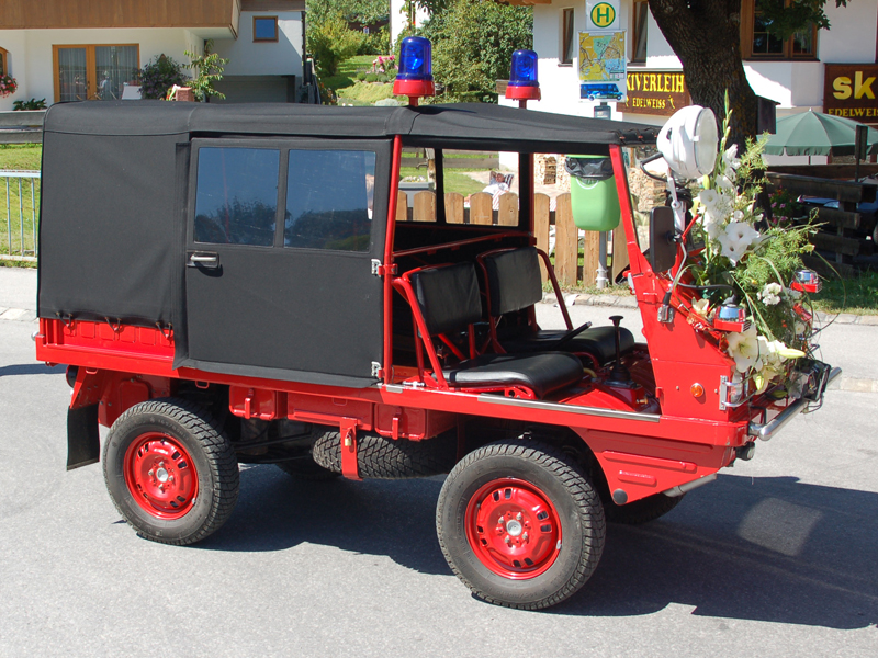 Steyr Puch Haflinger als Version für die Feuerwehr